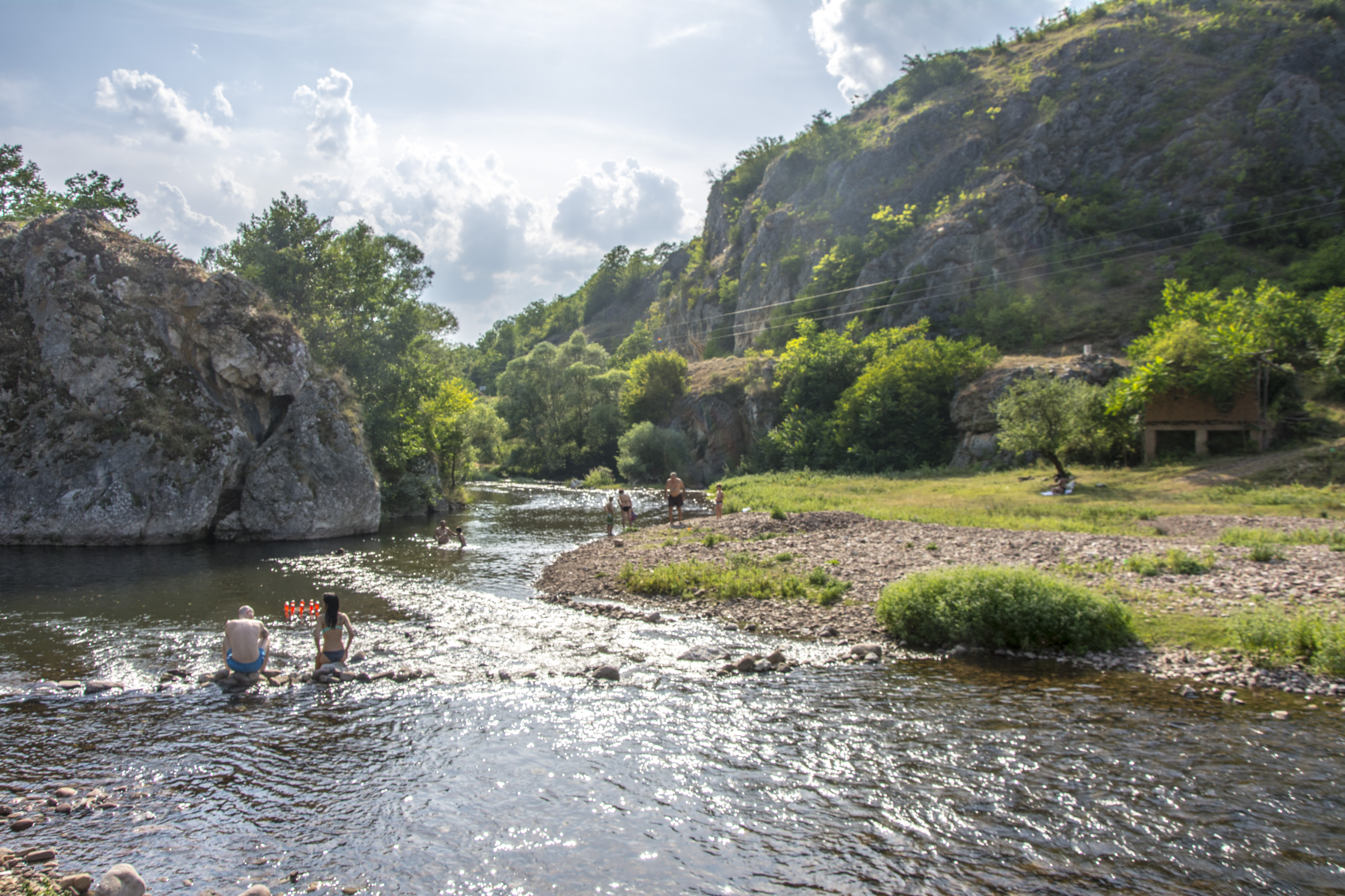 Kanjon reke Temšice kupalište